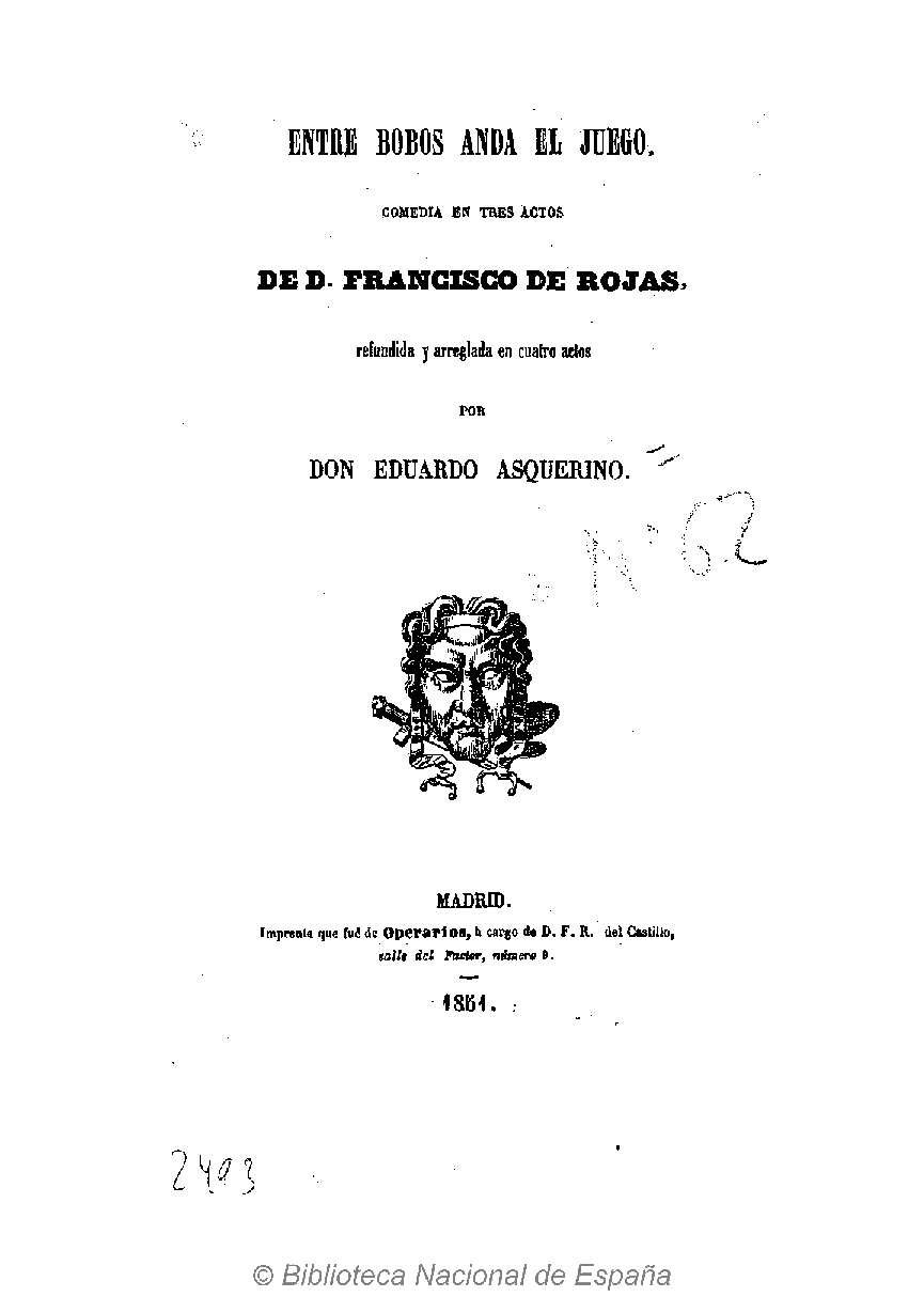 Entre bobos anda el juego : comedia en tres actos de Francisco de Rojas ; refundida y arreglada en cuatro actos por Eduardo Asquerino Autor: Rojas Zorrilla, Francisco de (1607-1648) ; Asquerino, Eduardo (1826-1881) Fecha: 1851 Datos de edición: Madrid, Imp. que fué de Operarios, a cargo de D.F.R. del Castillo